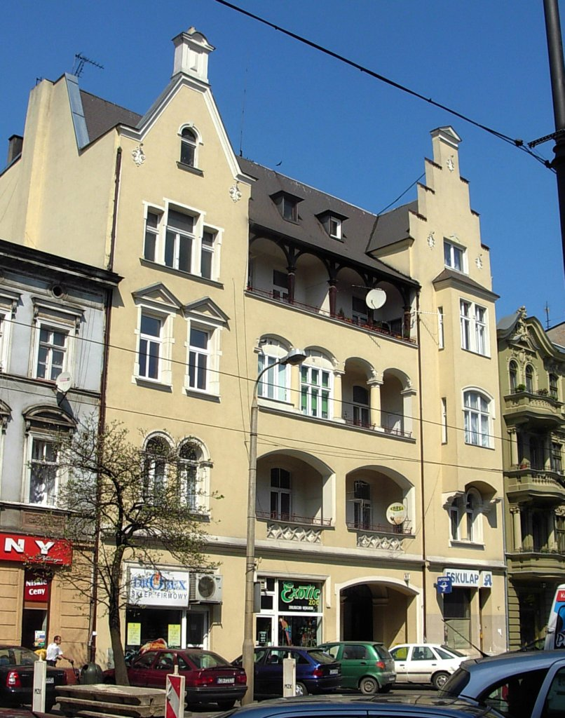 Kamienica ul. Gdańska 91 w Bydgoszczy